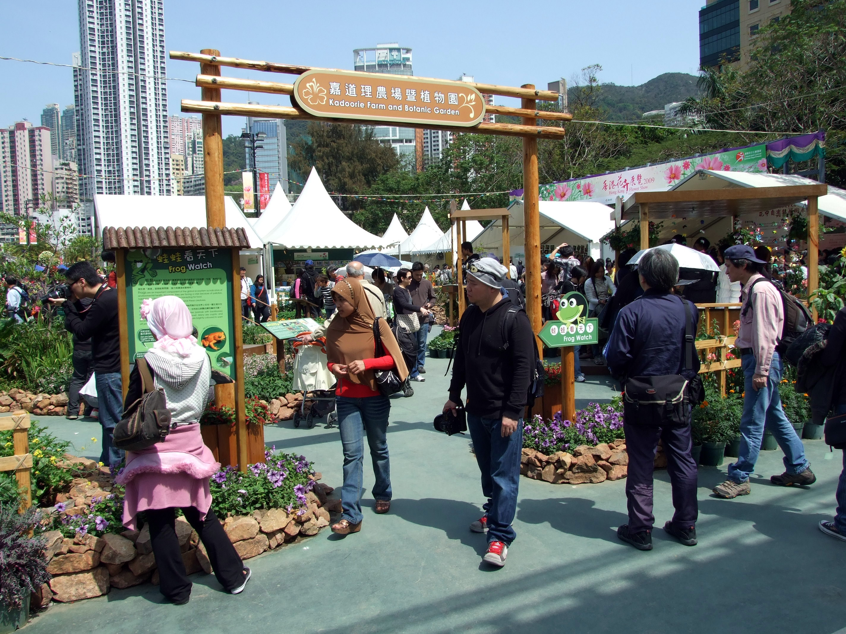 中文（香港）: 2009年香港花卉展覽中嘉道理農場暨植物園的展覽攤位